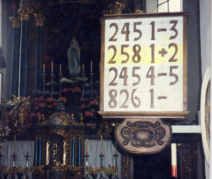 Weltweit einmaliges Unikat, das mit dem barocken Chorgestühl und dem barocken Ambo eine Einheit bildet. Nachdem die erste Seite abgearbeitet ist, dreht sich die Tafel automatisch für vier weitere Zeilen. Die Tafel gibt einerseits einen Überblick über das Liedprogramm, andererseits wird durch die Hinterleuchtung der Zeile die aktuelle Liednummer hervorgehoben. Gesteuert wird die Tafel über einen Mehrfunktions - Einknopftaster und einen zeitgesteuerten Automaten entweder vom Orgelmanual oder vom Mesnerstuhl aus. Die aus beschichtetem Blech hergestellten Ziffern werden mit Hilfe eines Magneten vom Setzkasten auf die Leisten gehängt. Datei:Ambo der Pfarrkirche Vils.jpg, Datei:Chorstuhl der Pfarrkirche Vils.jpg (Original text : selbst hergestellt und fotografiert)